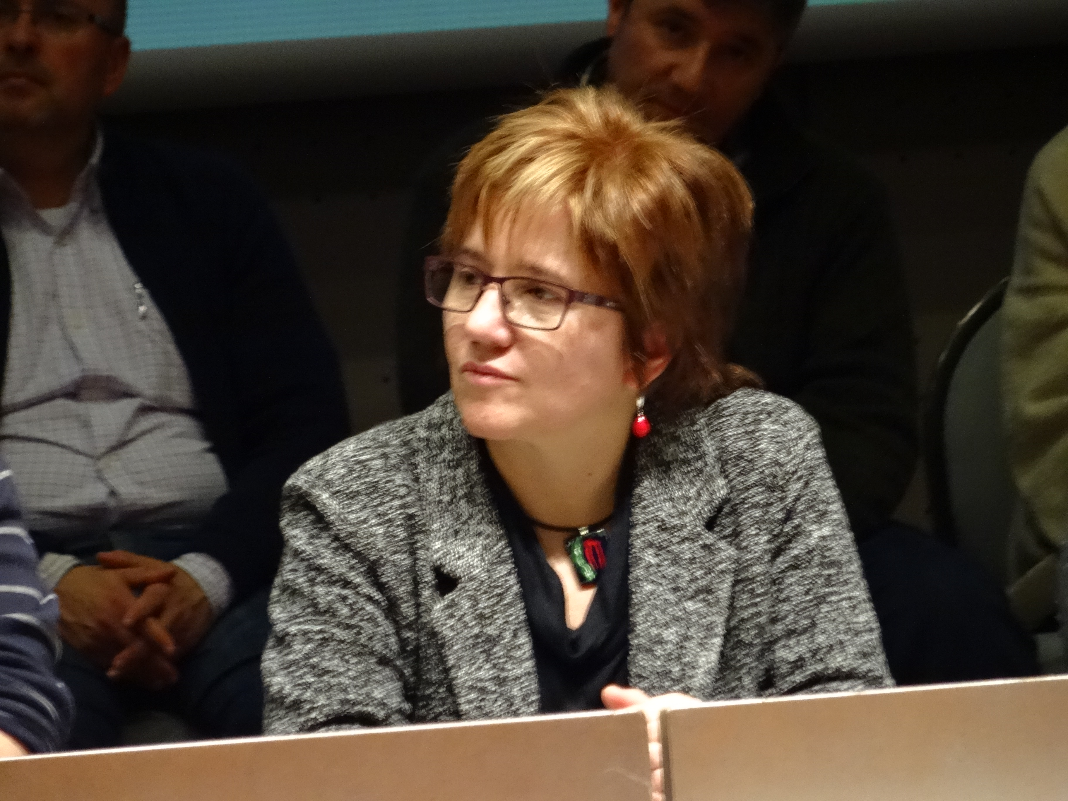 Ver título.